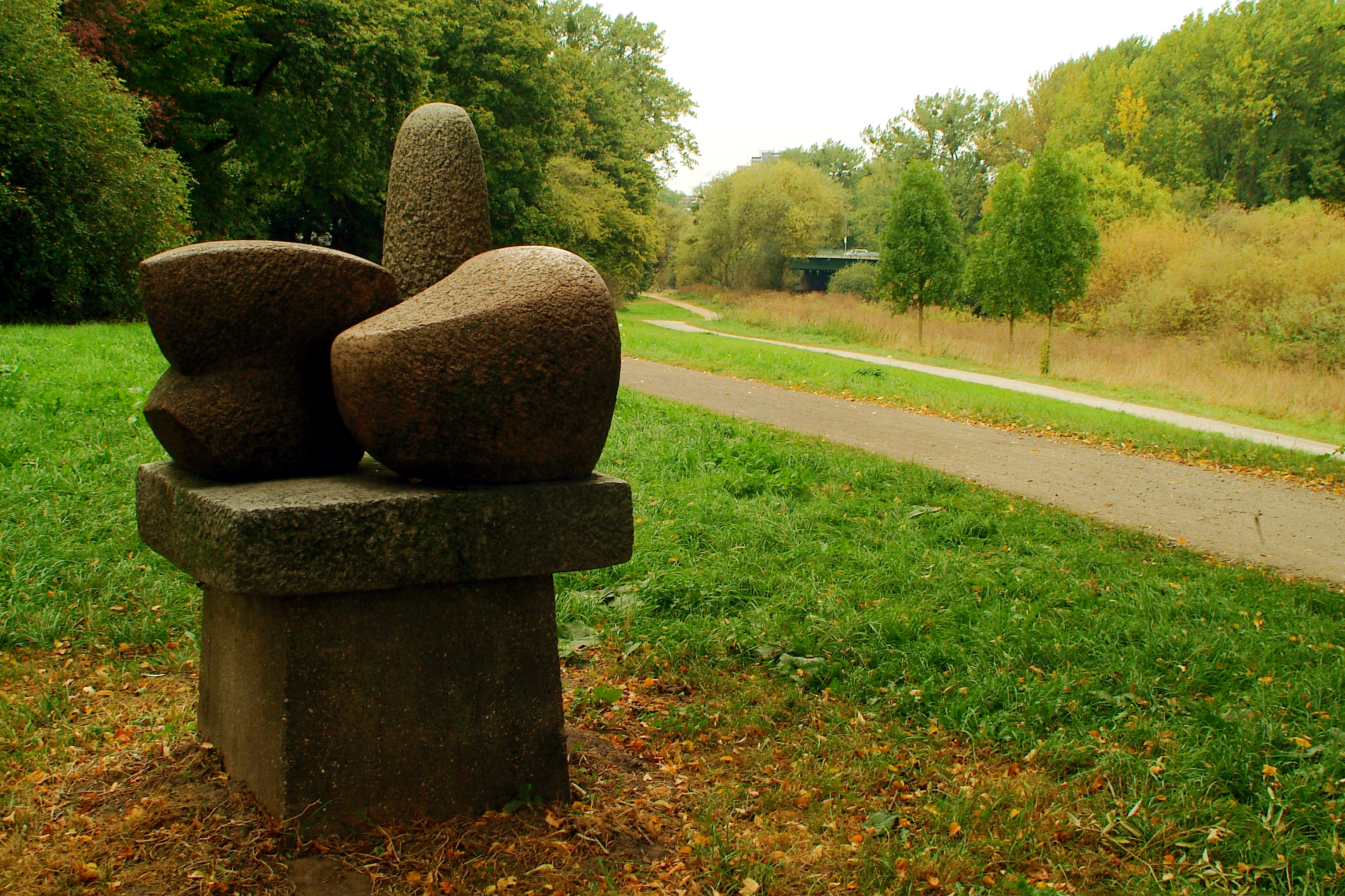 Die Skulptur Großer Vogel von Max Sauk, 1962, aufgestellt in den Grünanlagen zwischen dem Krankenhaus Siloah (heute: KRK-Klinikum Siloah) und der Ihme in Hannover. Blick Richtung Legionsbrücke.